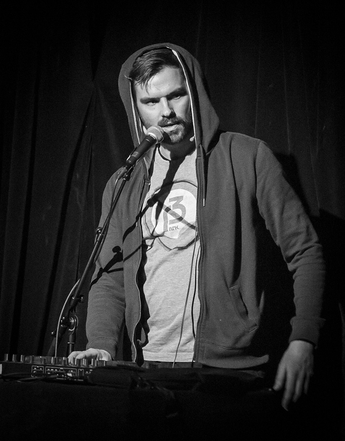 Henrik Thodesen på "Crap åppå Park"-festivalen på Parkteateret